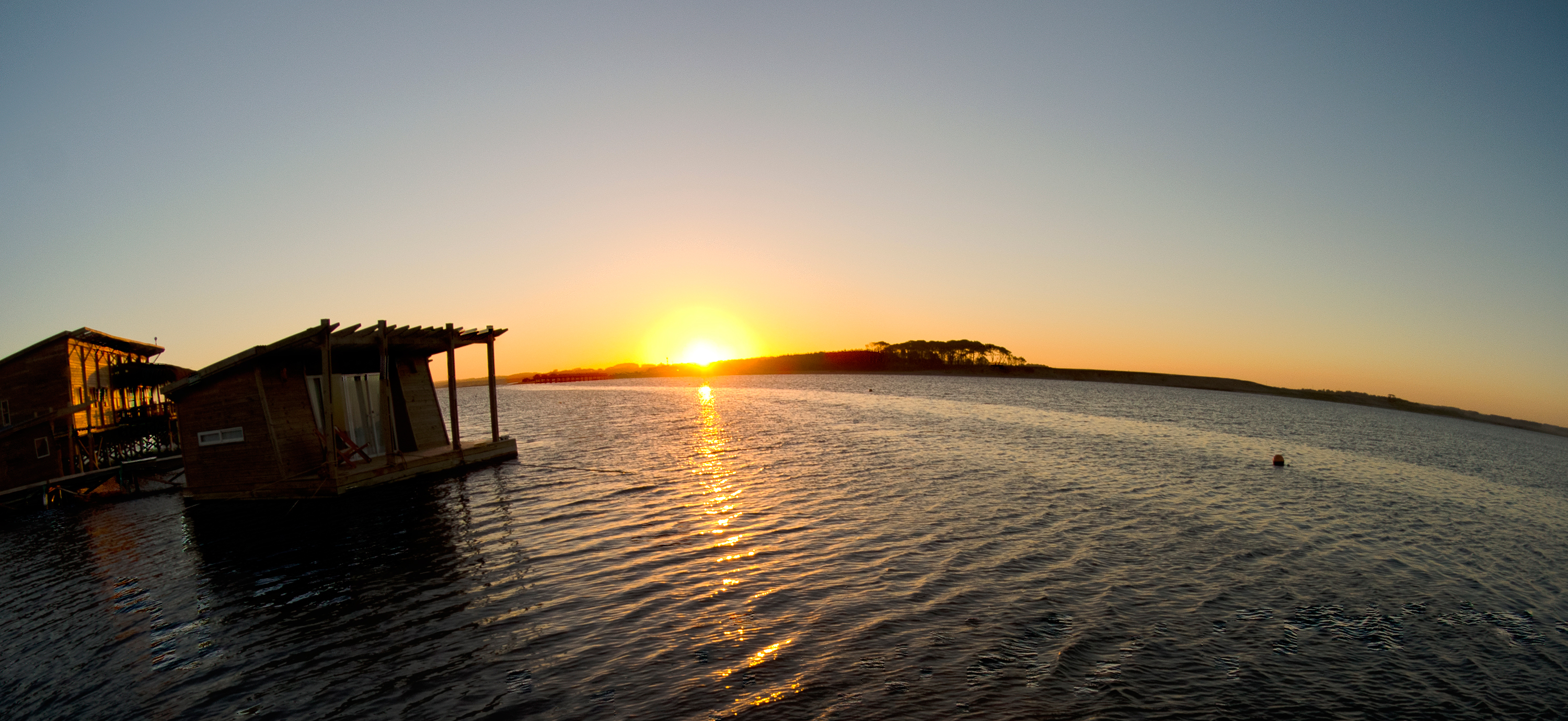 Laguna Garzón vista desde el hotel flotante sobre la laguna.